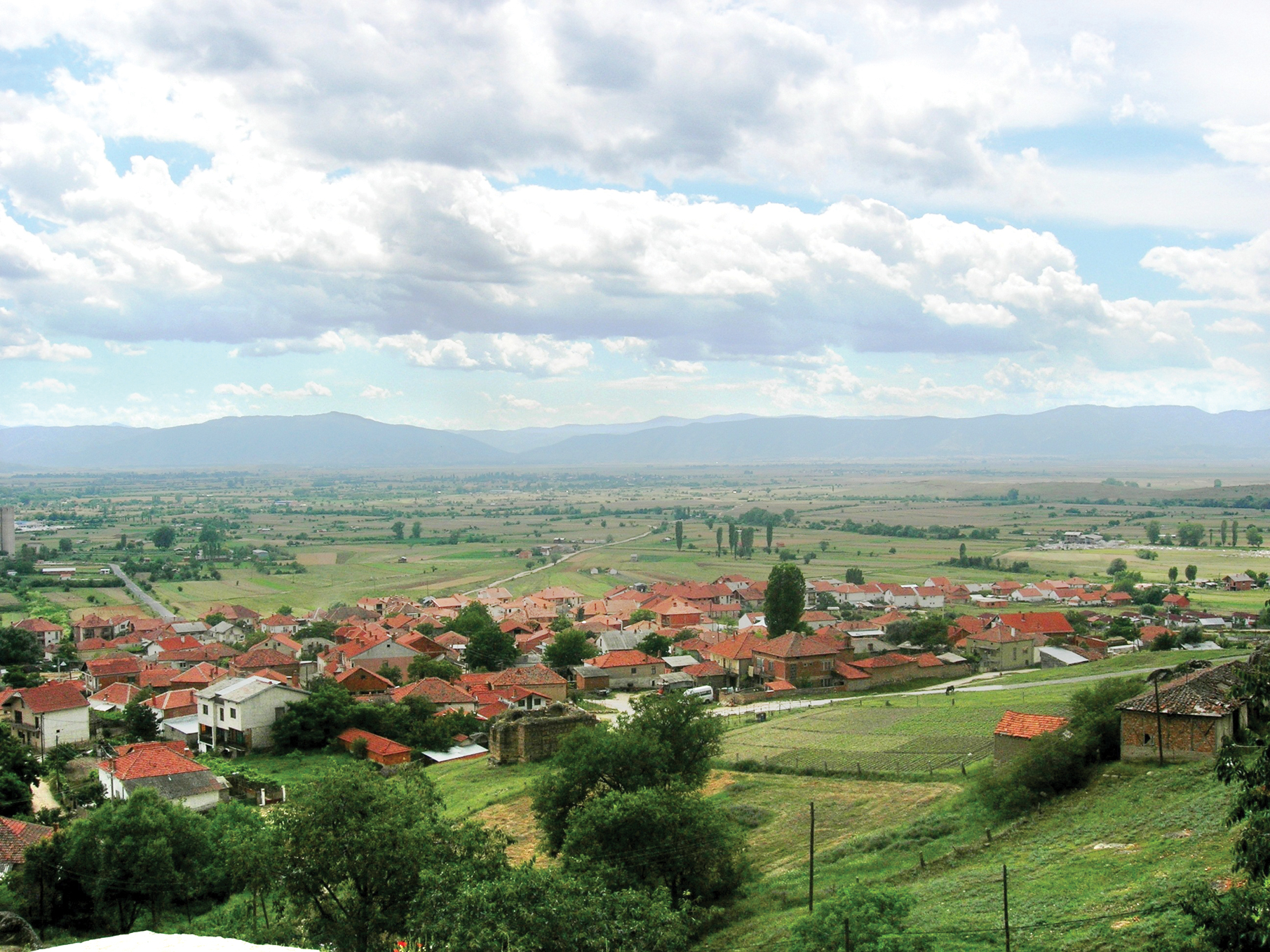 Varoš village, Prilep, Macedonia